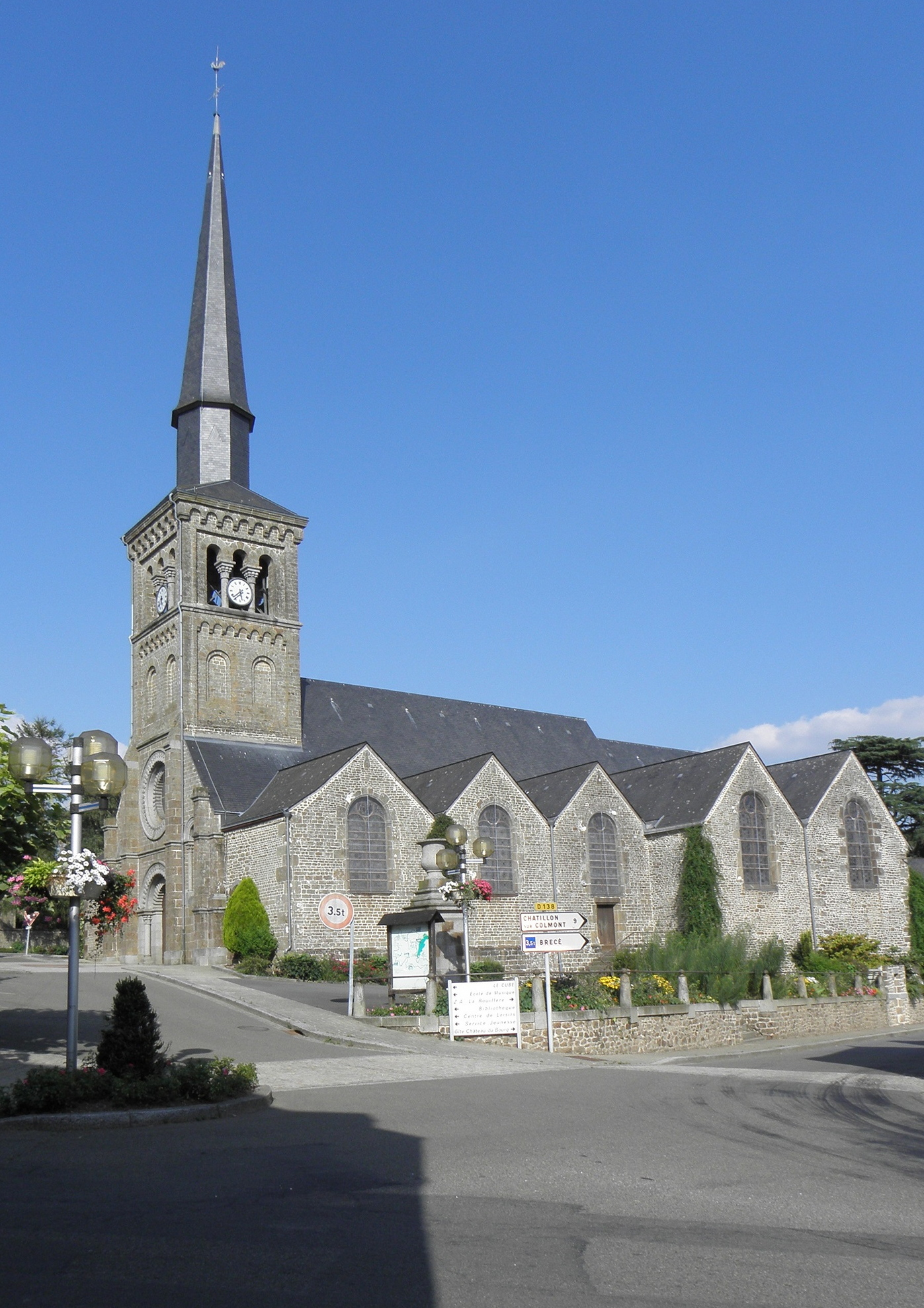 Vue méridionale de l'église de Saint-Denis-de-Gastines (53).